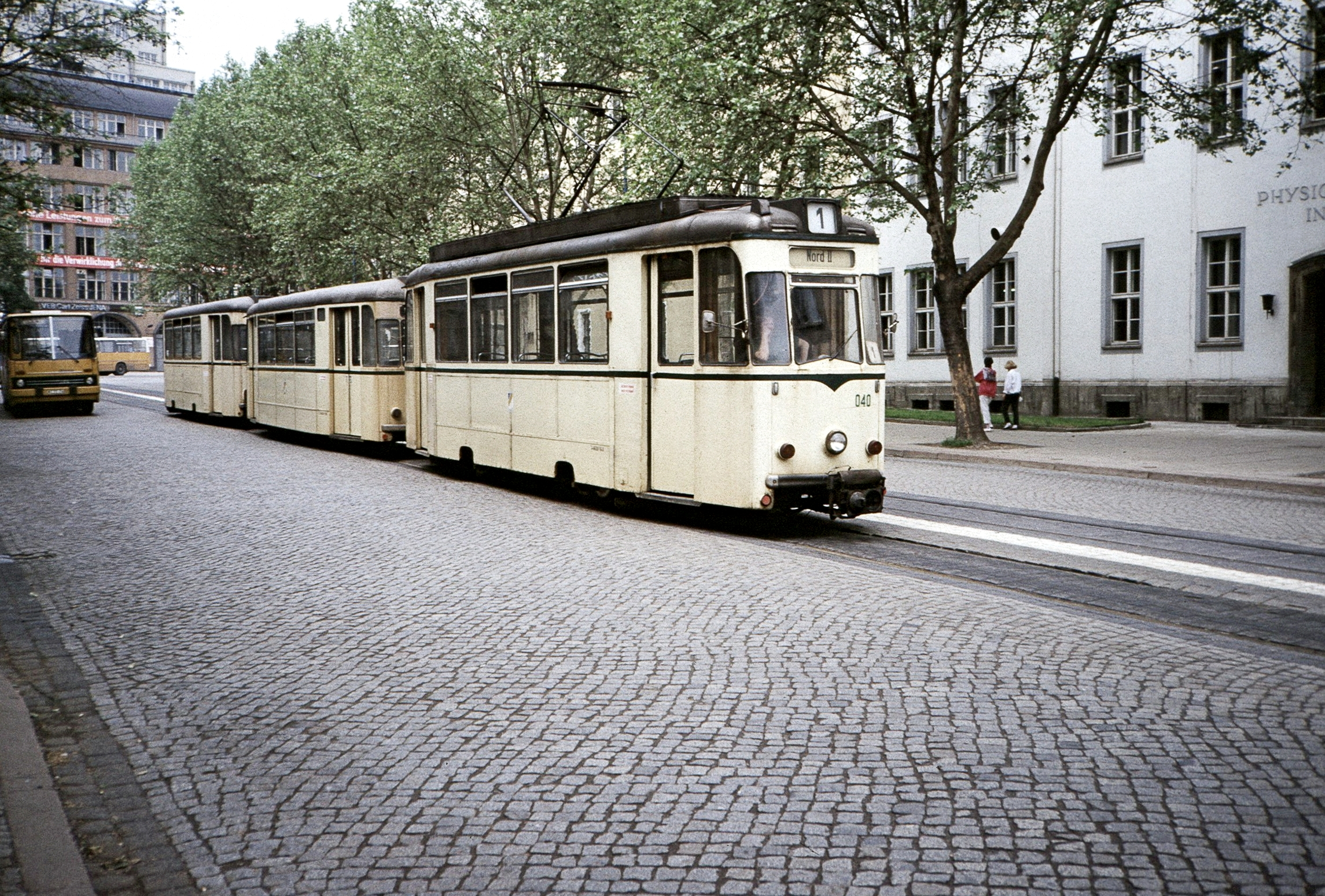 Zug mit Rekotriebwagen in Jena